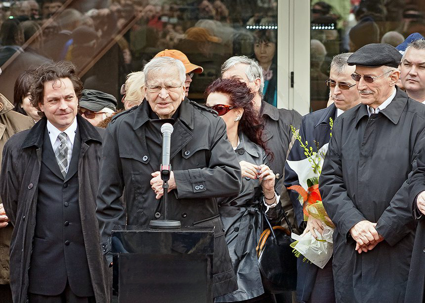 O stea pentru eternitate pe Hall of Fame acordata maestrului Radu Beligan